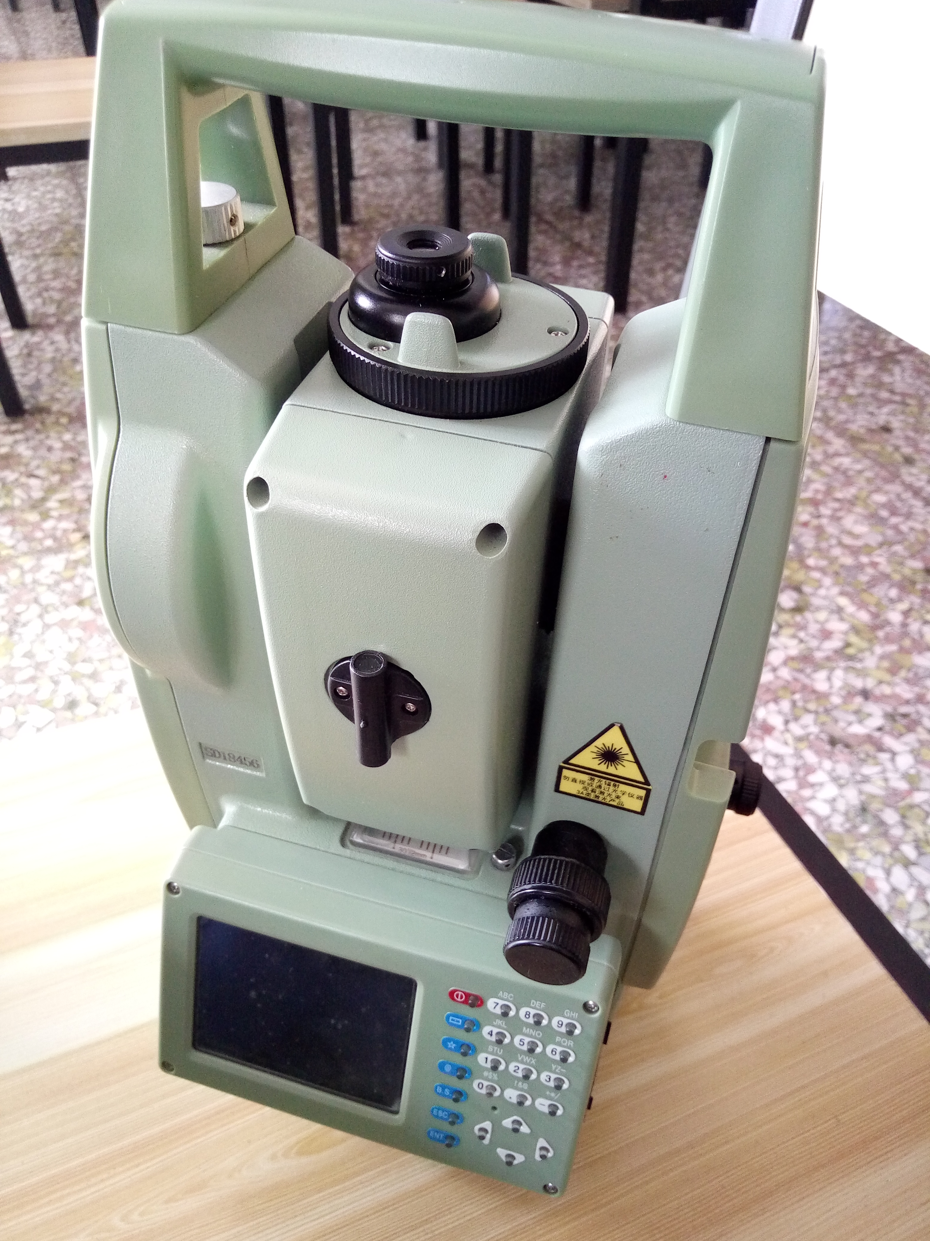 一台南方测绘公司生产的全站仪